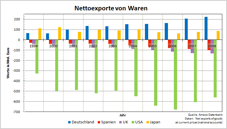 Nettoexporte im Vergleich